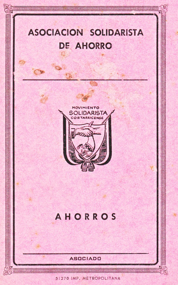 Titulní strana průkazky člena solidaristické asociace v Kostarice.